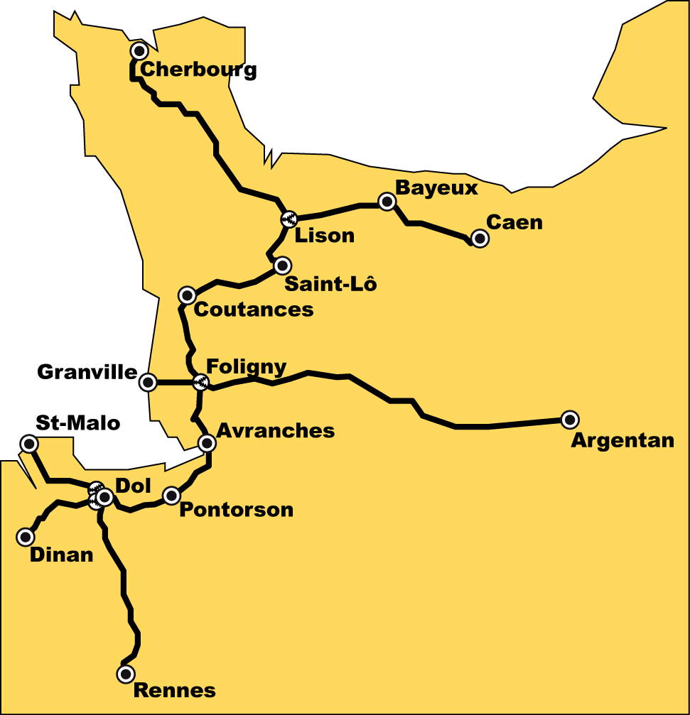 Carte de la ligne ferroviaire Caen-Rennes avec les embranchements vers Cherbourg, Argentan, Saint-Malo et Dinan.